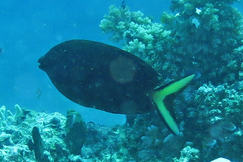 Siganus punctatissimus en isla Lizard, Queensland, Australia